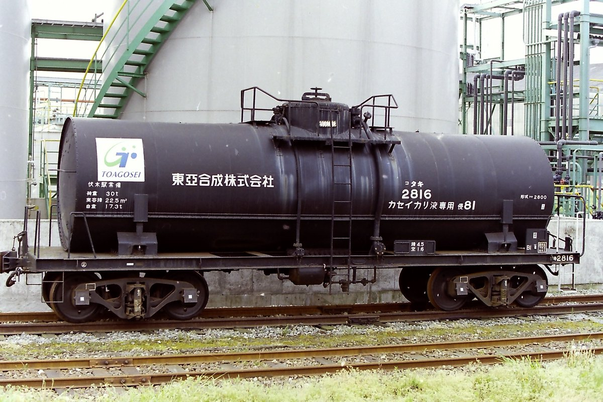 東亞合成 コタキ2816